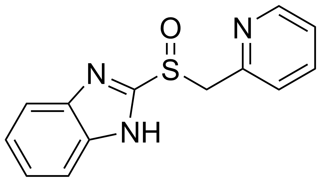 Skeletal structure of timoprazole